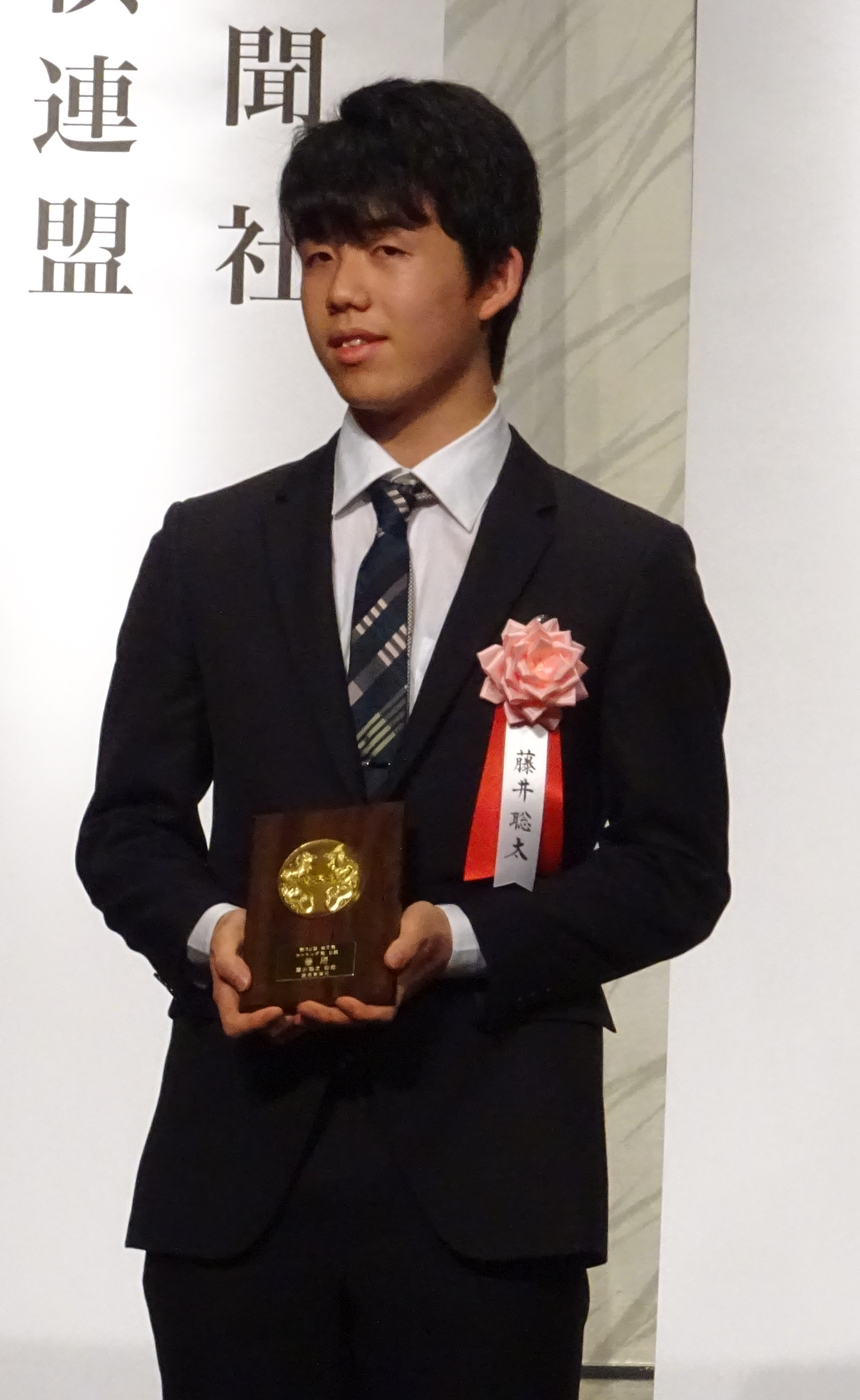 藤井聡太 第30期竜王就位式（2018年）ランキング戦 6組優勝